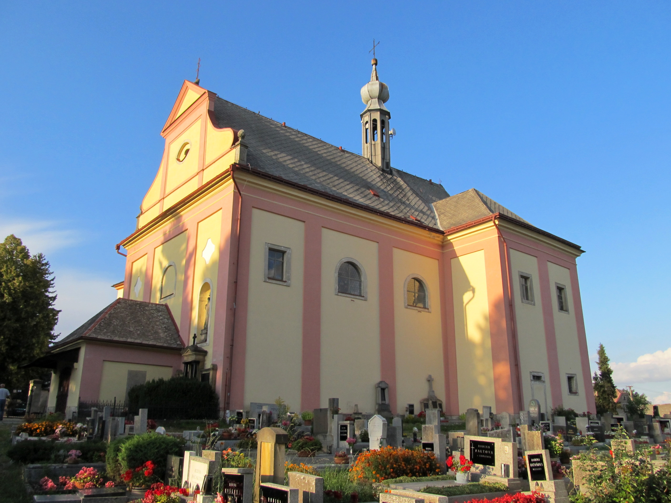 Kostel sv. Ducha (Hořičky)